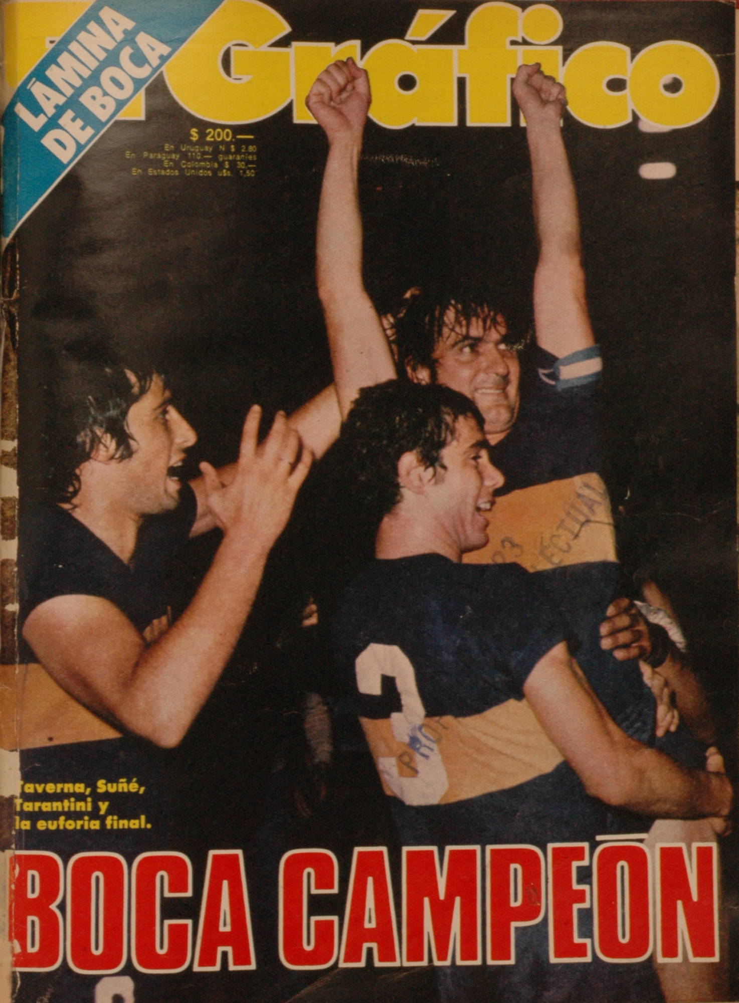 El Gráfico del 28 de Diciembre de 1976. Edición 2986.